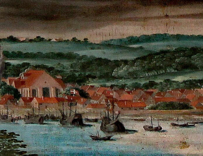 Sankt-Marien-Kirche auf dem Beyerschen Epitaph in St. Marien (Flensburg) von 1591; mit der Schiffbrücke im Vordergrund